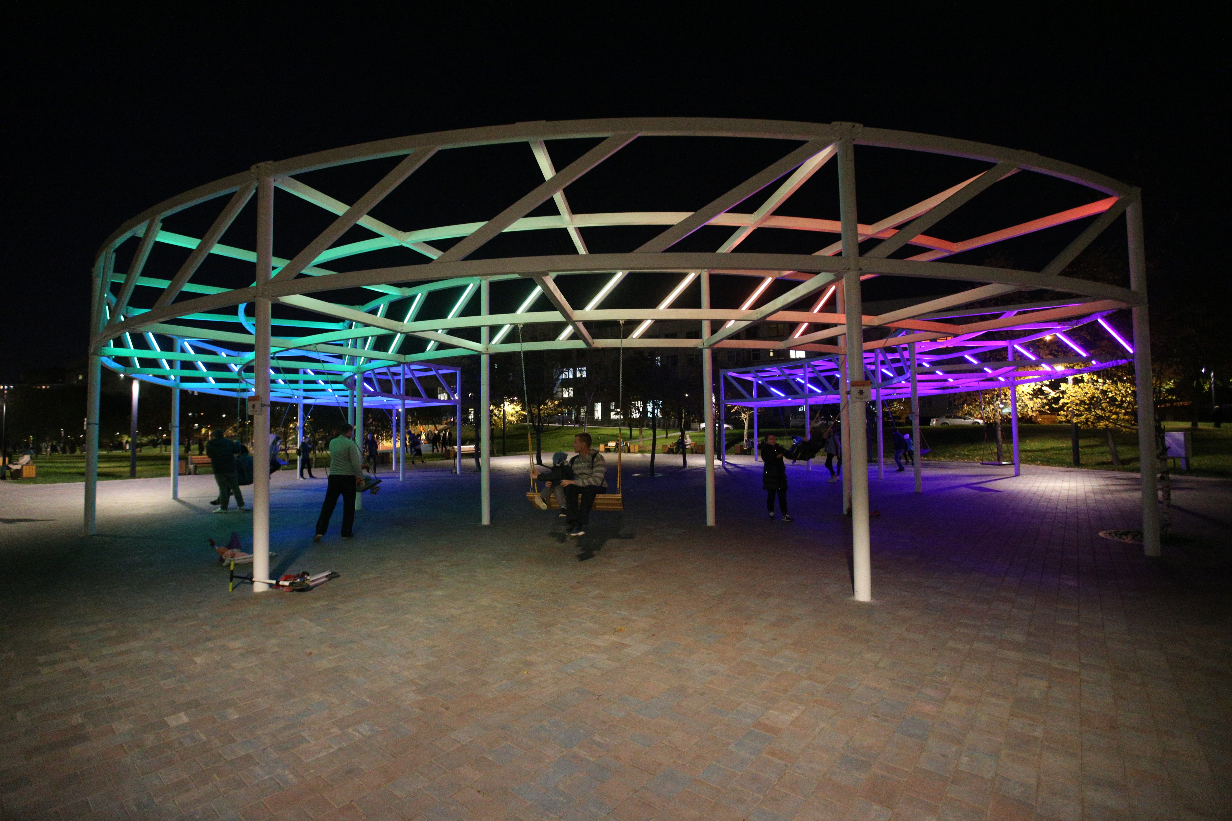 Большие круговые качели в Парке света в Бибирево с динамической подсветкой (в темное время суток)